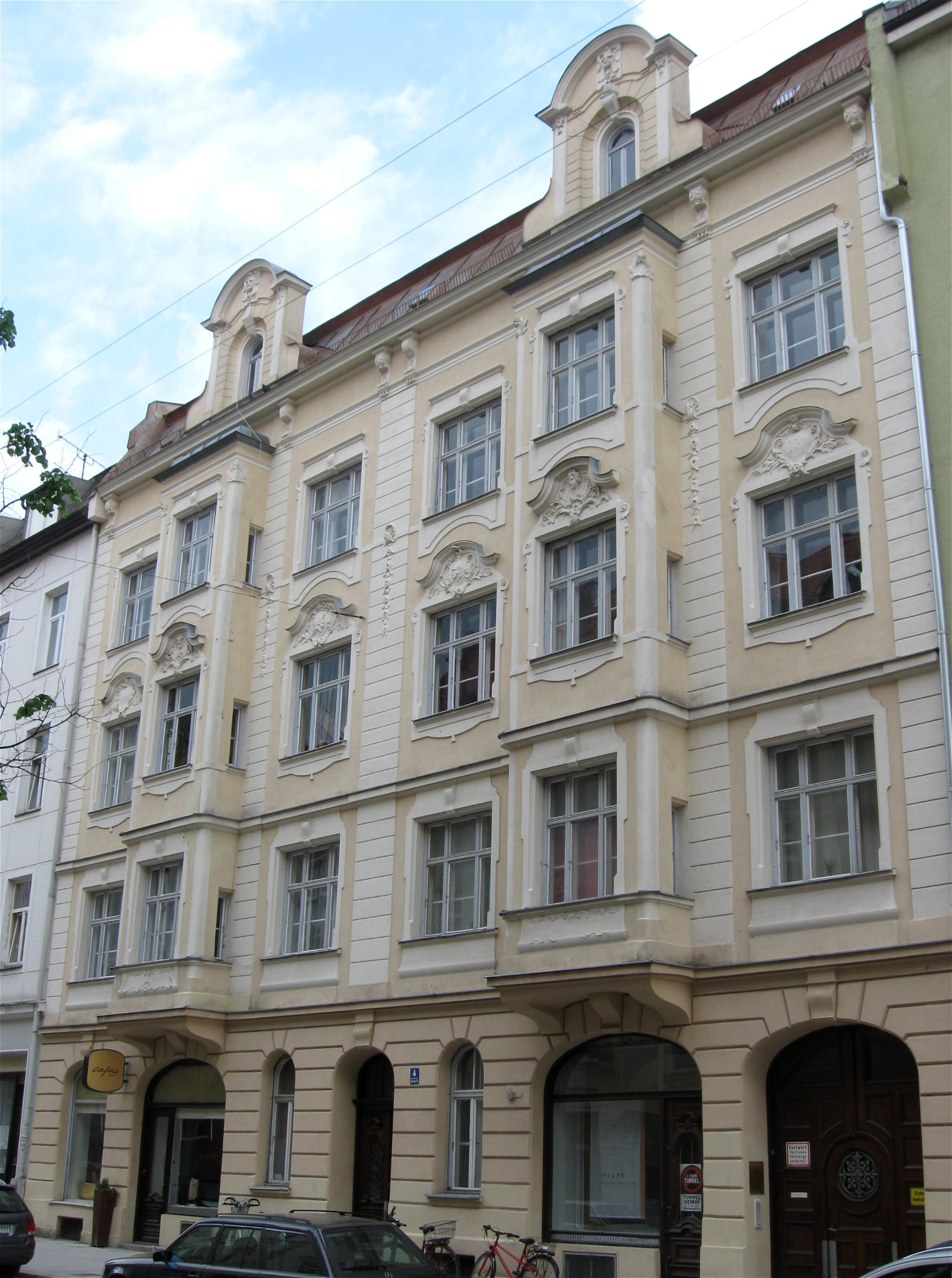 Breisacher Straße 4; Mietshaus, neubarock, mit zwei Erkern, reich gegliedert und stuckiert, um 1890/1900.